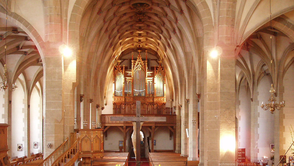 Blick vom Hochchor nach Westen durch das dreischiffige Kirchengebäude zur Empore mit Orgel in der Stiftskirche in Öhringen